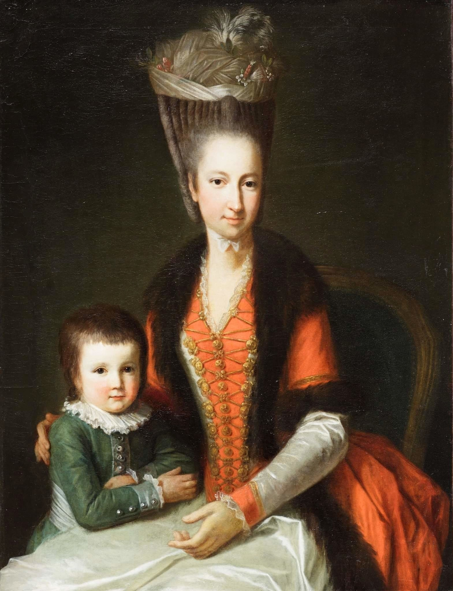 Беларуская (тарашкевіца): Партрэт Тэафіліі Сапегі (Teafilija Sapieha) з роду Ябланоўскіх з сынам Аляксандрам Антоніем